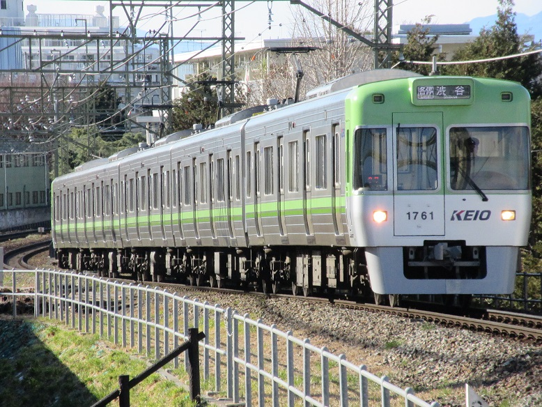 京王電鉄1000系1711編成の写真